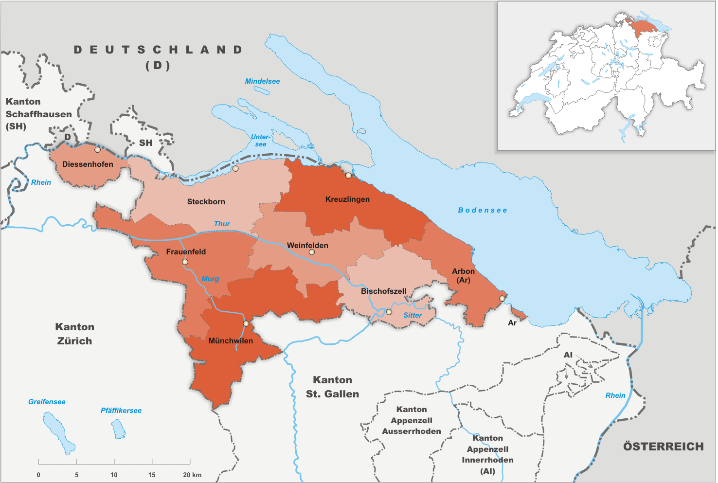 Bezirke des Kanton Thurgau.